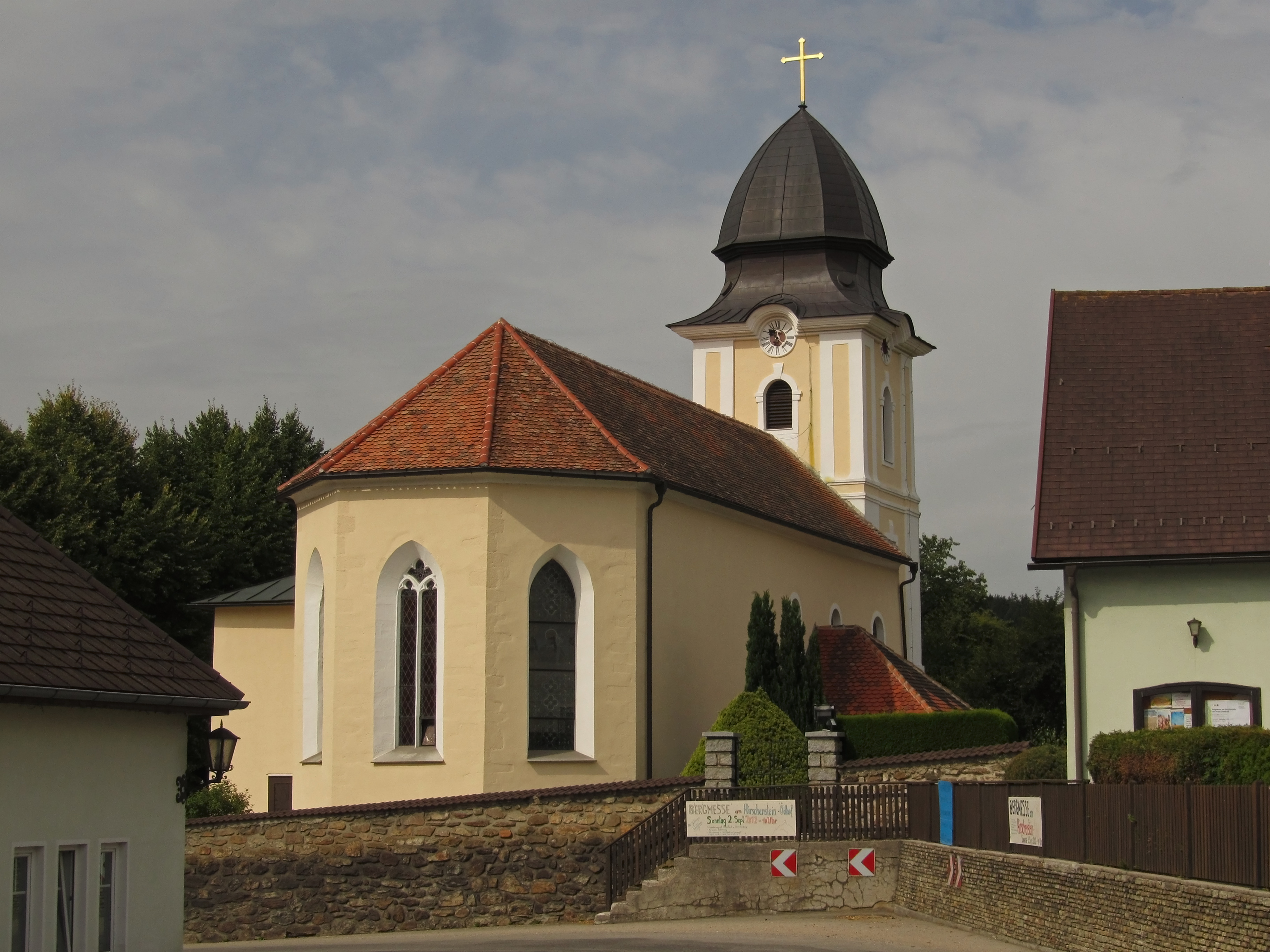 Kath. Pfarrkirche hl. Margarethe und Friedhof